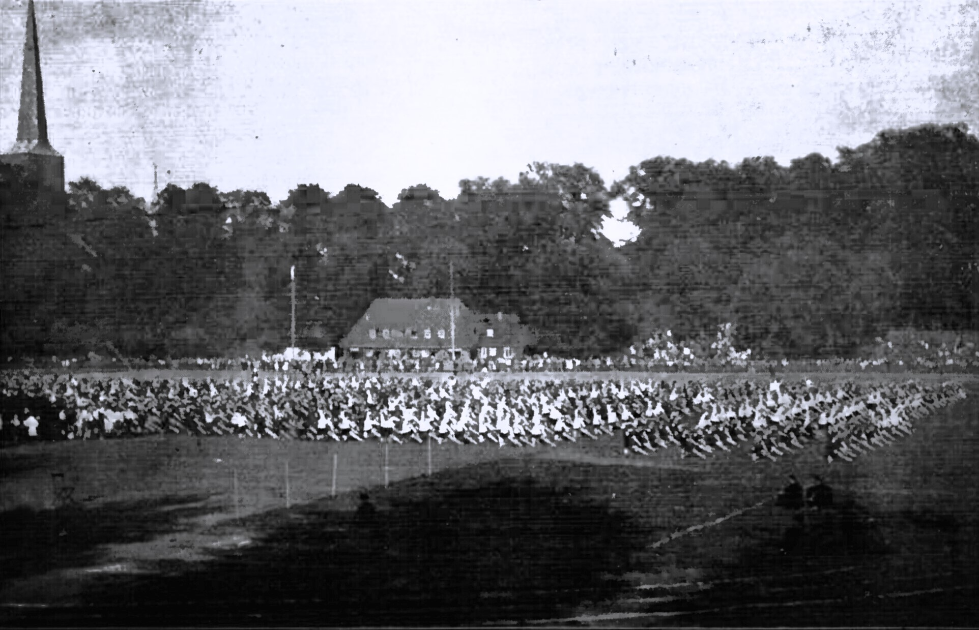 Am 13. September fanden auf dem Sportplatz Buniamshof die diesjährigen Kampfspiele der Lübecker Schulen statt. Gerade diese Veranstaltung, an der etwa 2000 Schülerinnen und Schüler aller Lübecker Schulen teilnahmen, zeigte, wie gerade Turnen und Sport Einzug in die Schulen gehalten hat. Ganz besonders gefallen konnten die Massenübungen der Knaben und Mädchen. In Säulen marschierten die einzelnen Abteilungen vor dem Podium auf und unter den Klängen der Schutzmannskapelle wurden die gymnastischen Freiübungen ausgeführt.